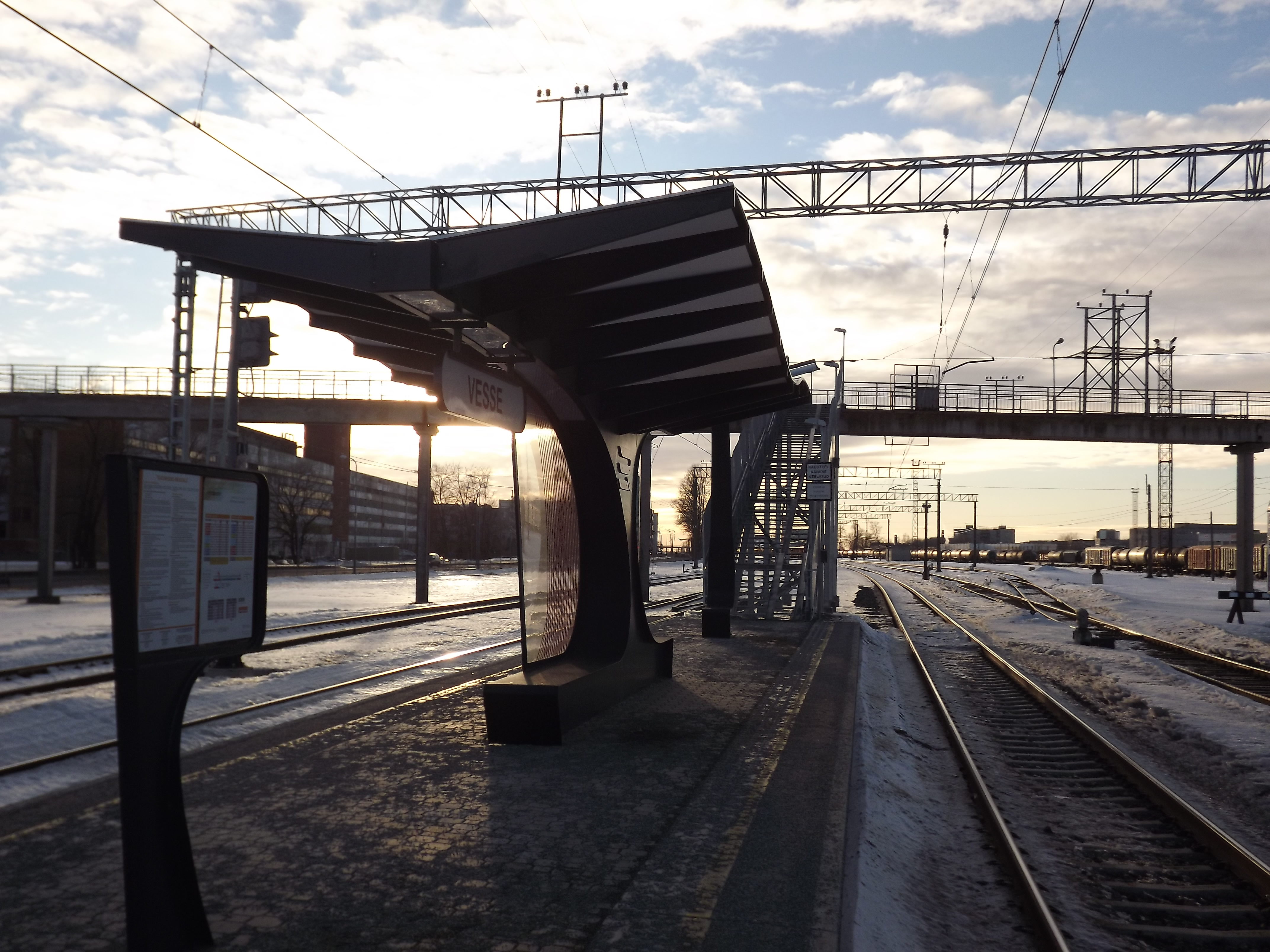 Vesse raudteepeatus